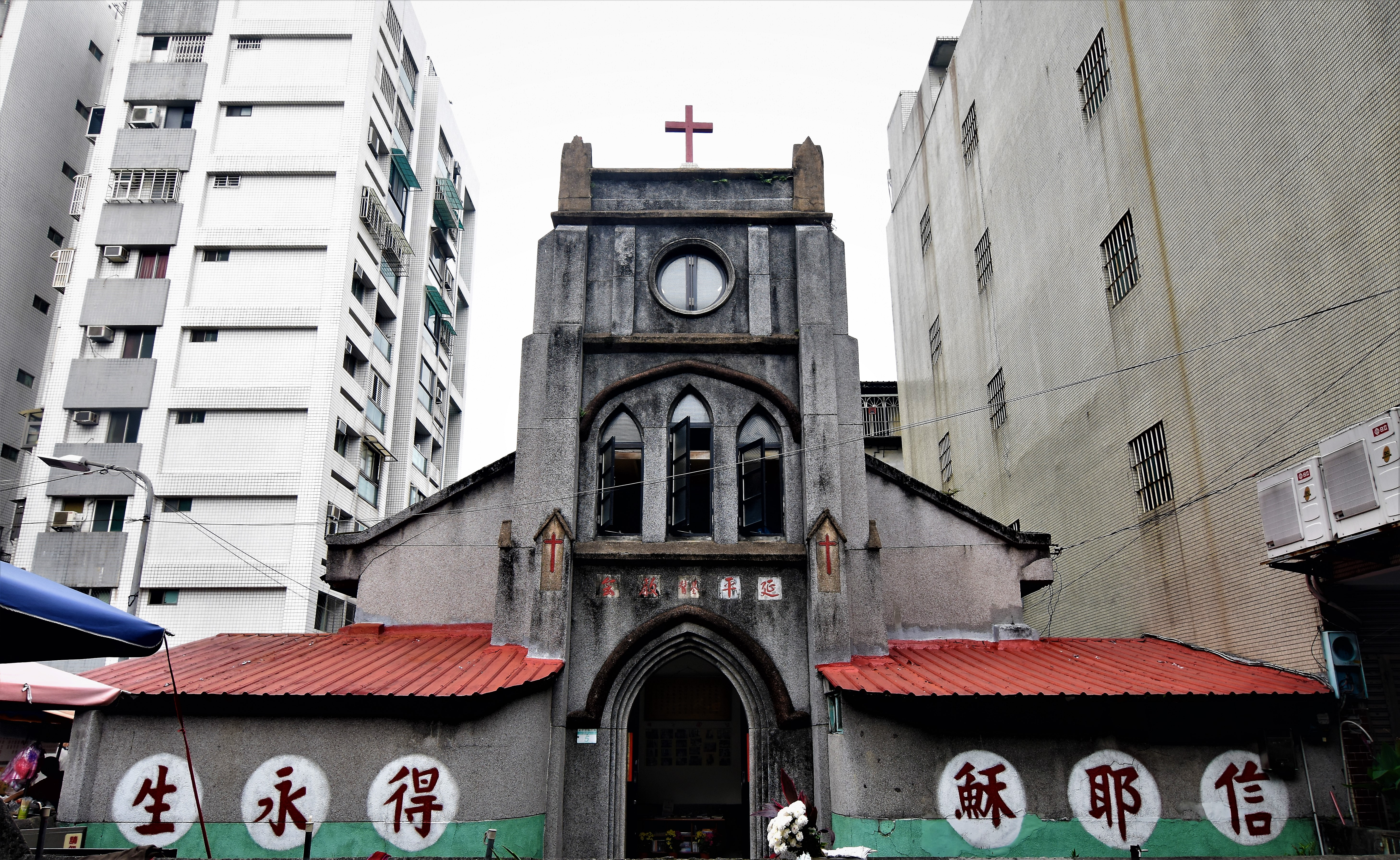 中文（台灣）: 延平基督教會外觀